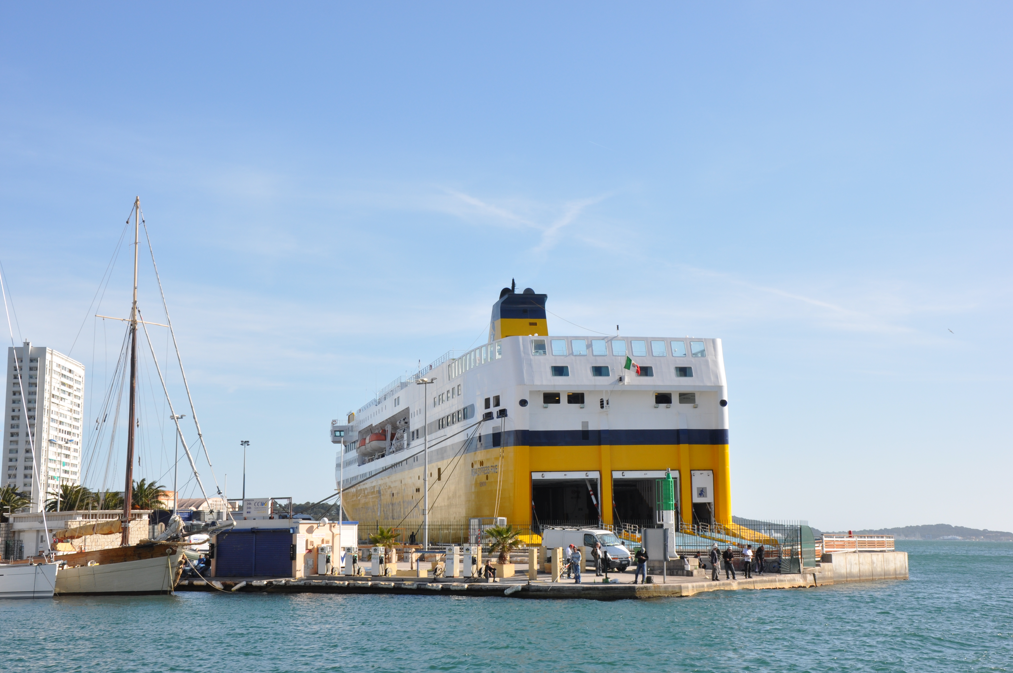 Ferries, Toulon, Provence-Alpes-Côte d'Azur, France